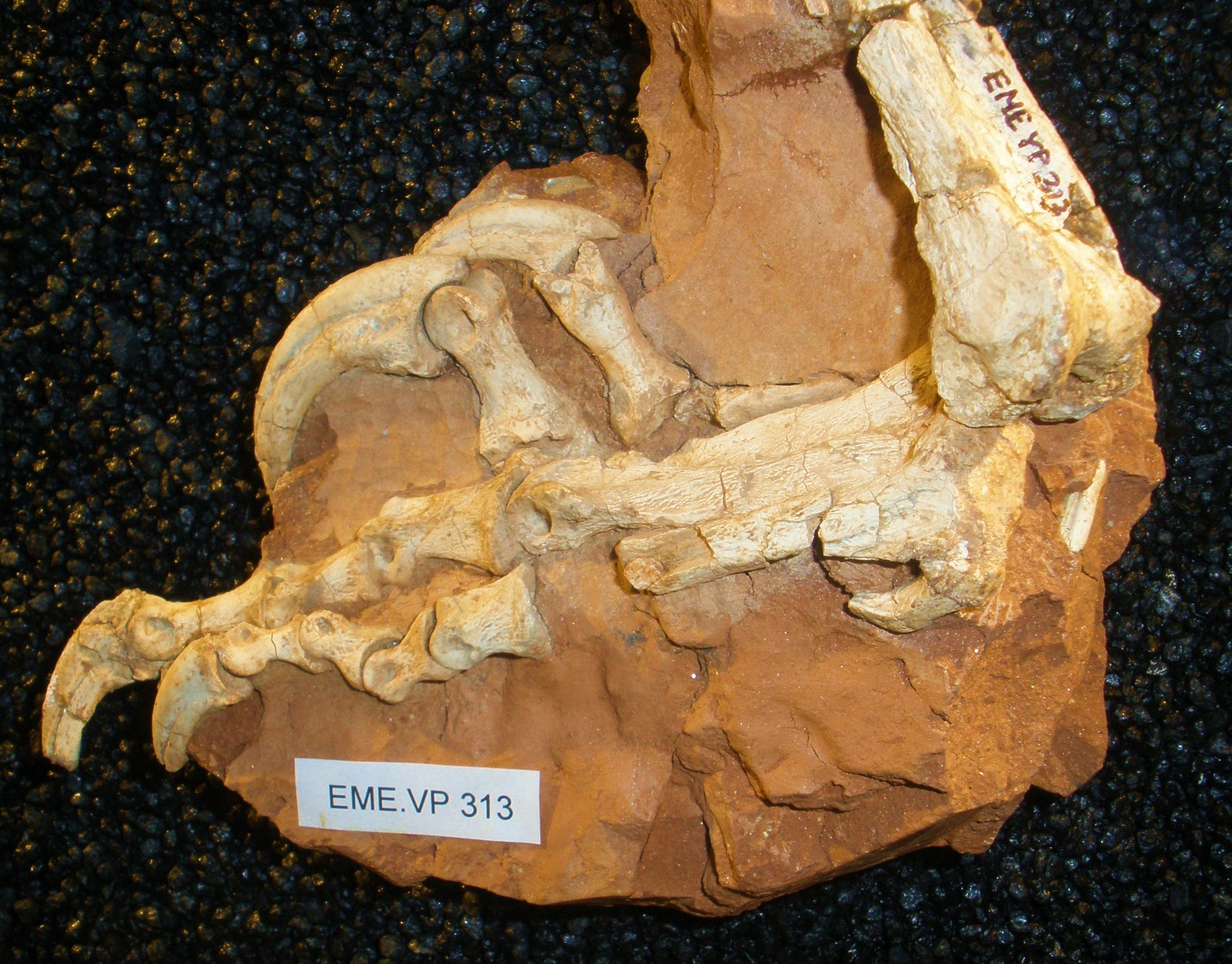 Fossil of Balaur, an extinct theropod- Took the photo at Fossil Show, Munich